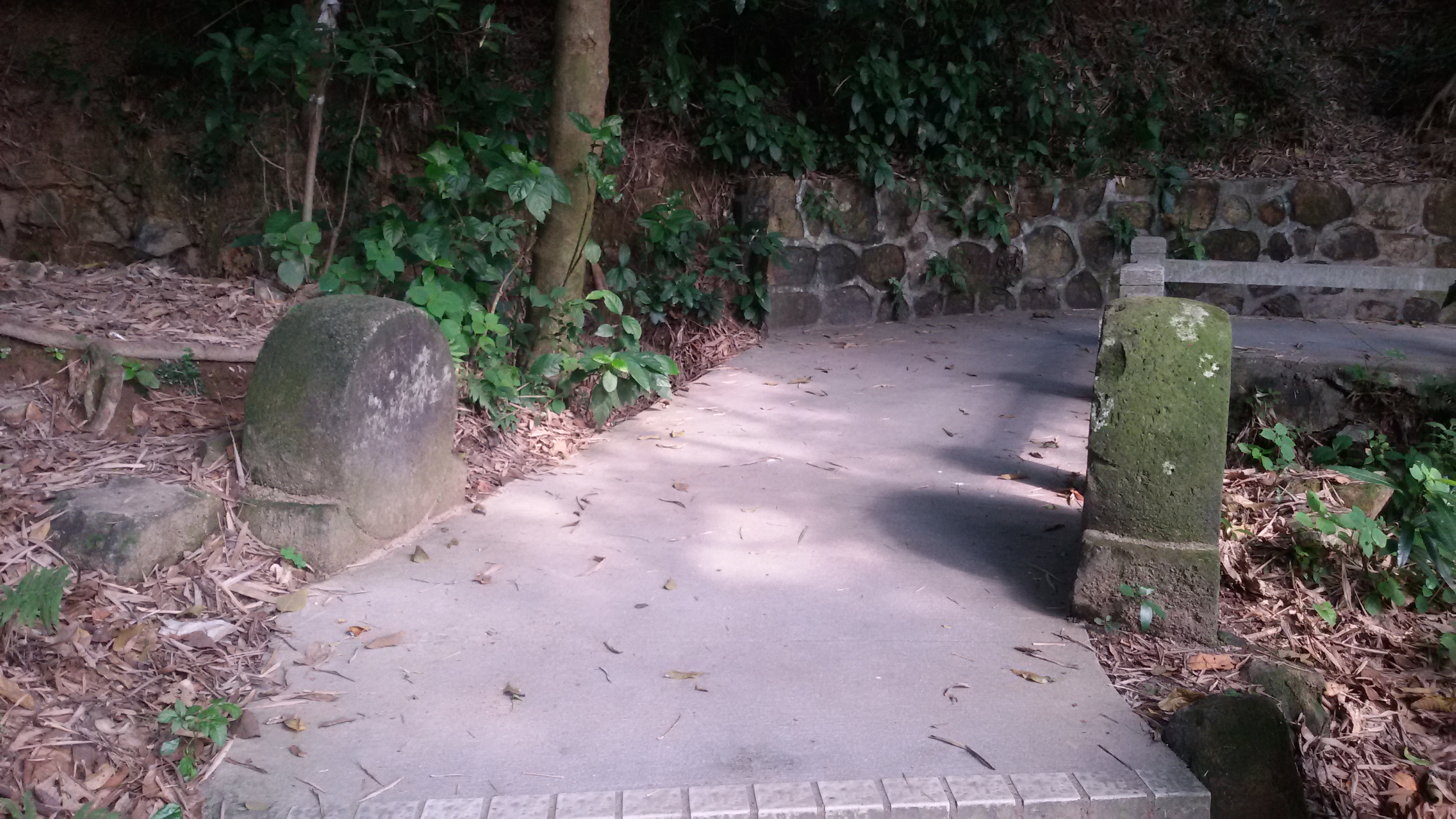 粵語: 景泰寺遺址附近嘅兩嚿凈低嘅石碑